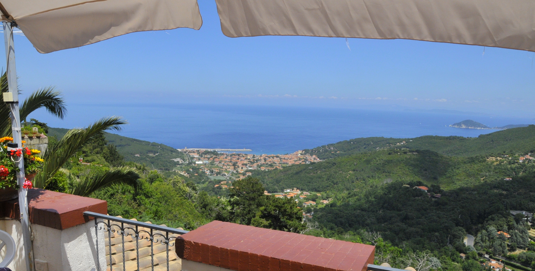 Poggio (Elba), Blick von der Piazza 20 Settembre zum Meer bei Marciana Marina